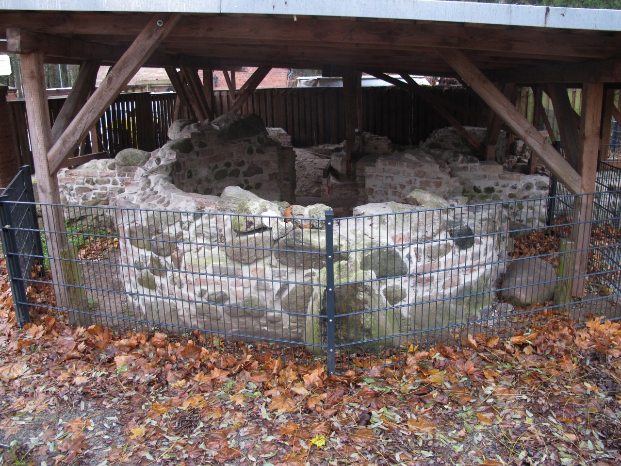 Alte Hakeburg. 2013 wurden die Fundamente der alten Hakeburg wieder ausgegraben und gesichert. Siehe auch Alte Hakeburg